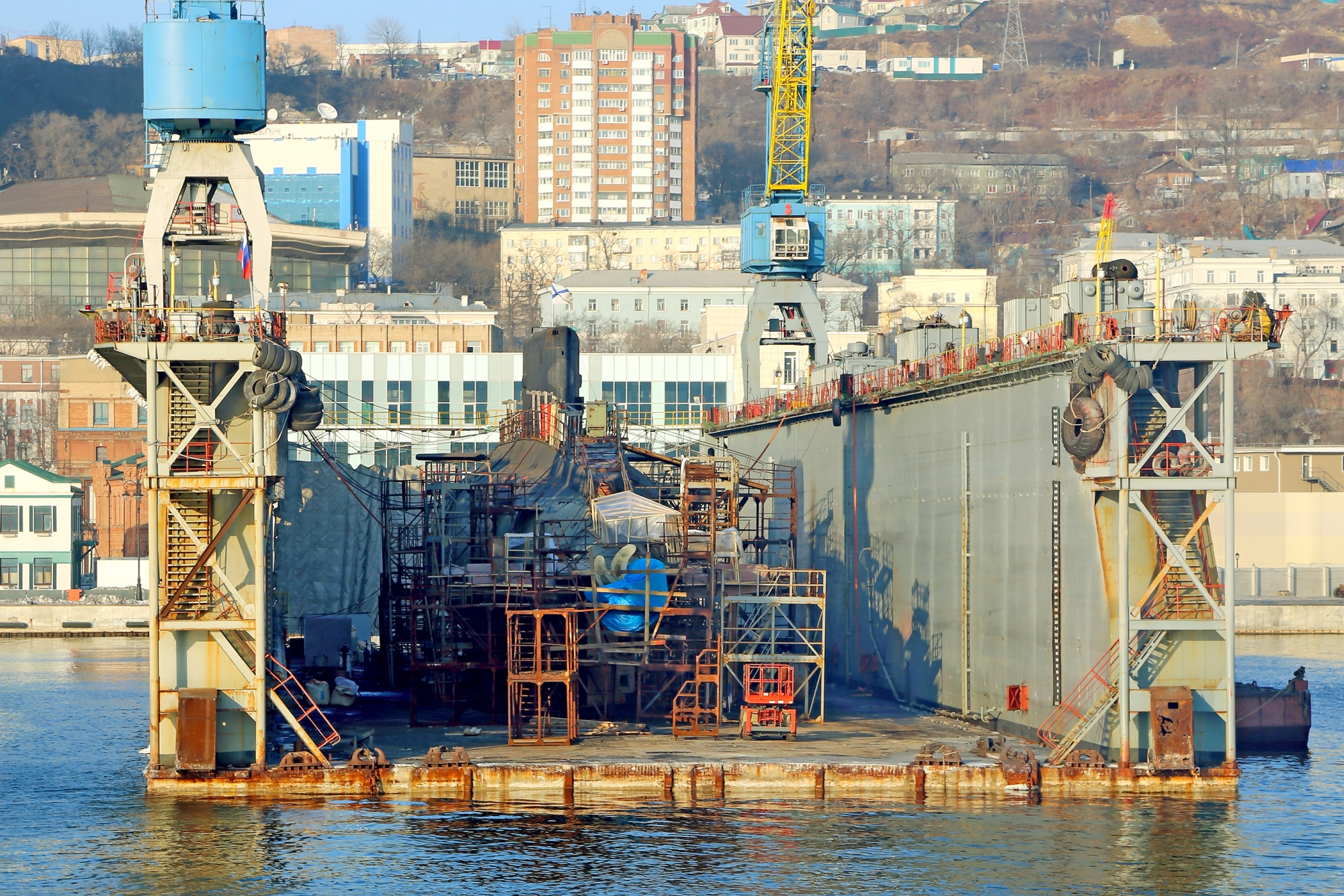 Дизель-электрическая подводная лодка проекта 877В «Б-187» в доке Дальзавода